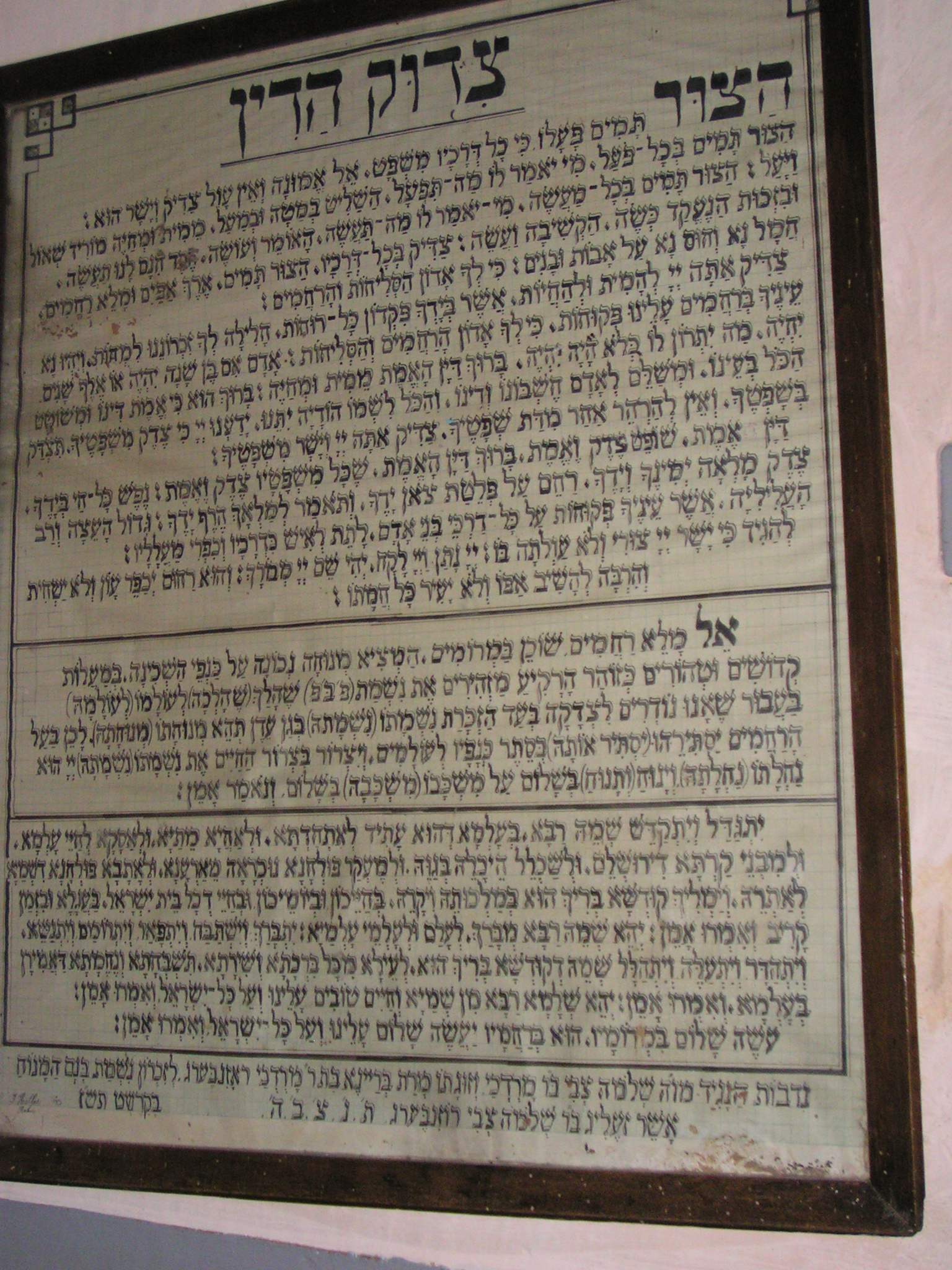 כרזת "צידוק הדין" בבית העלמין היהודי בפלטיצ'ן, רומניה